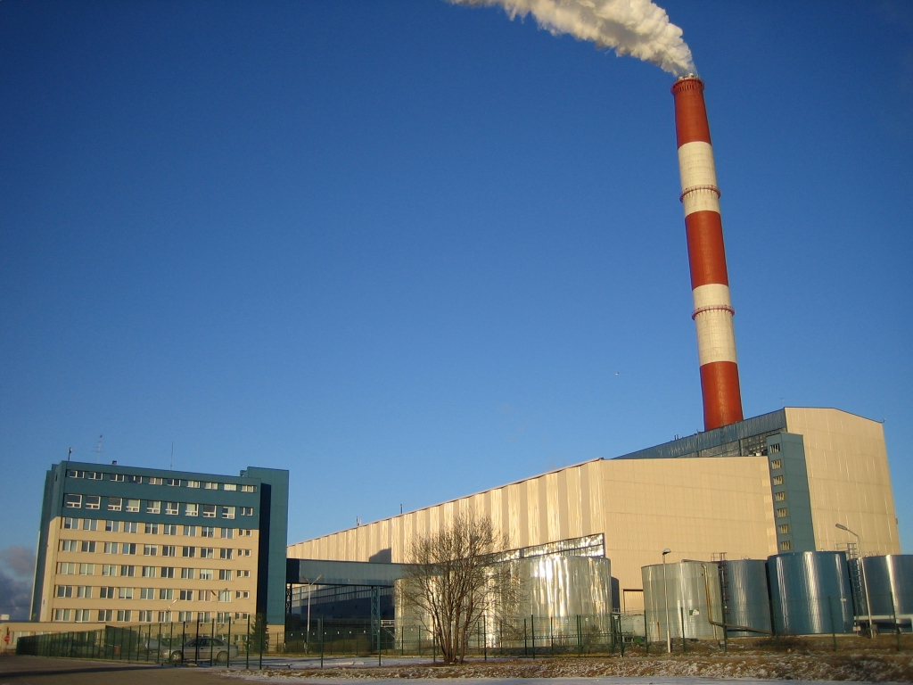 Iru elektrijaam. Jaanuar 2006